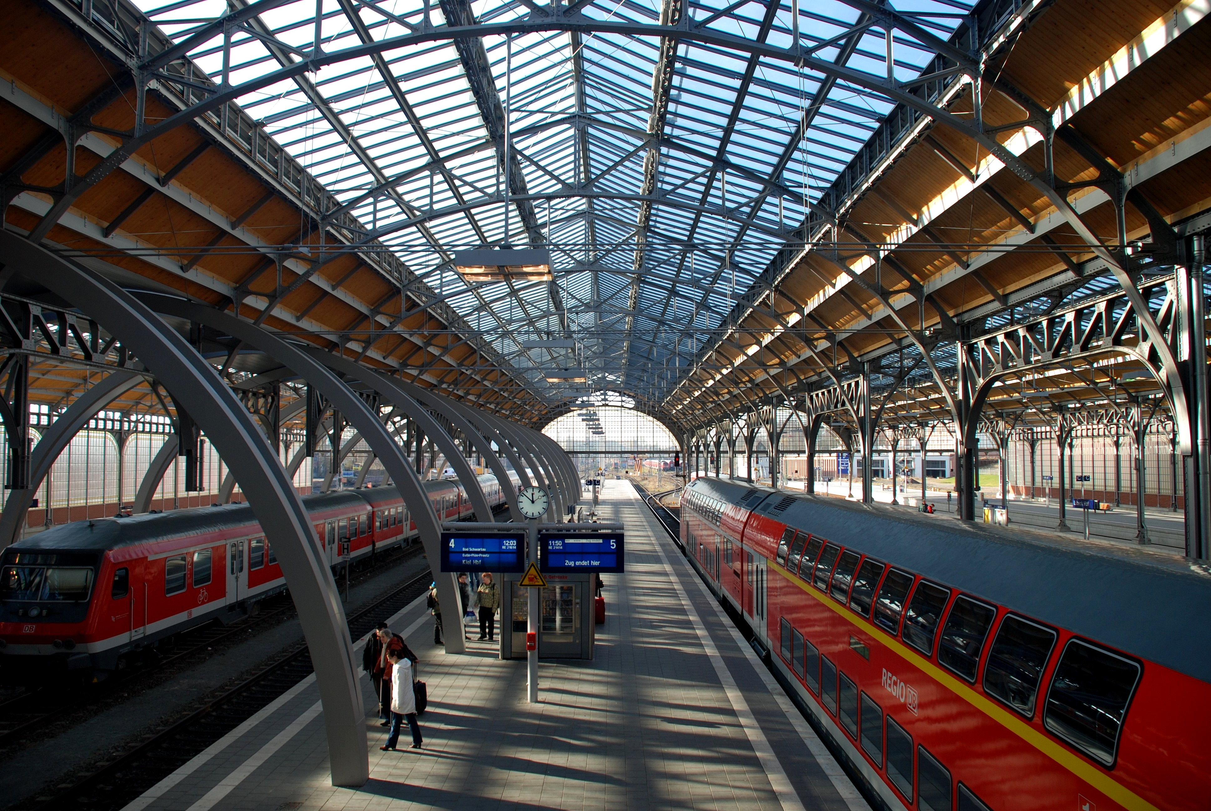 Lübeck Hauptbahnhof, neue Halle von 2007